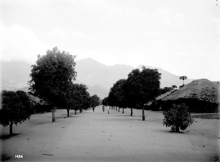 Straße zum Bezirksamt in Morogoro